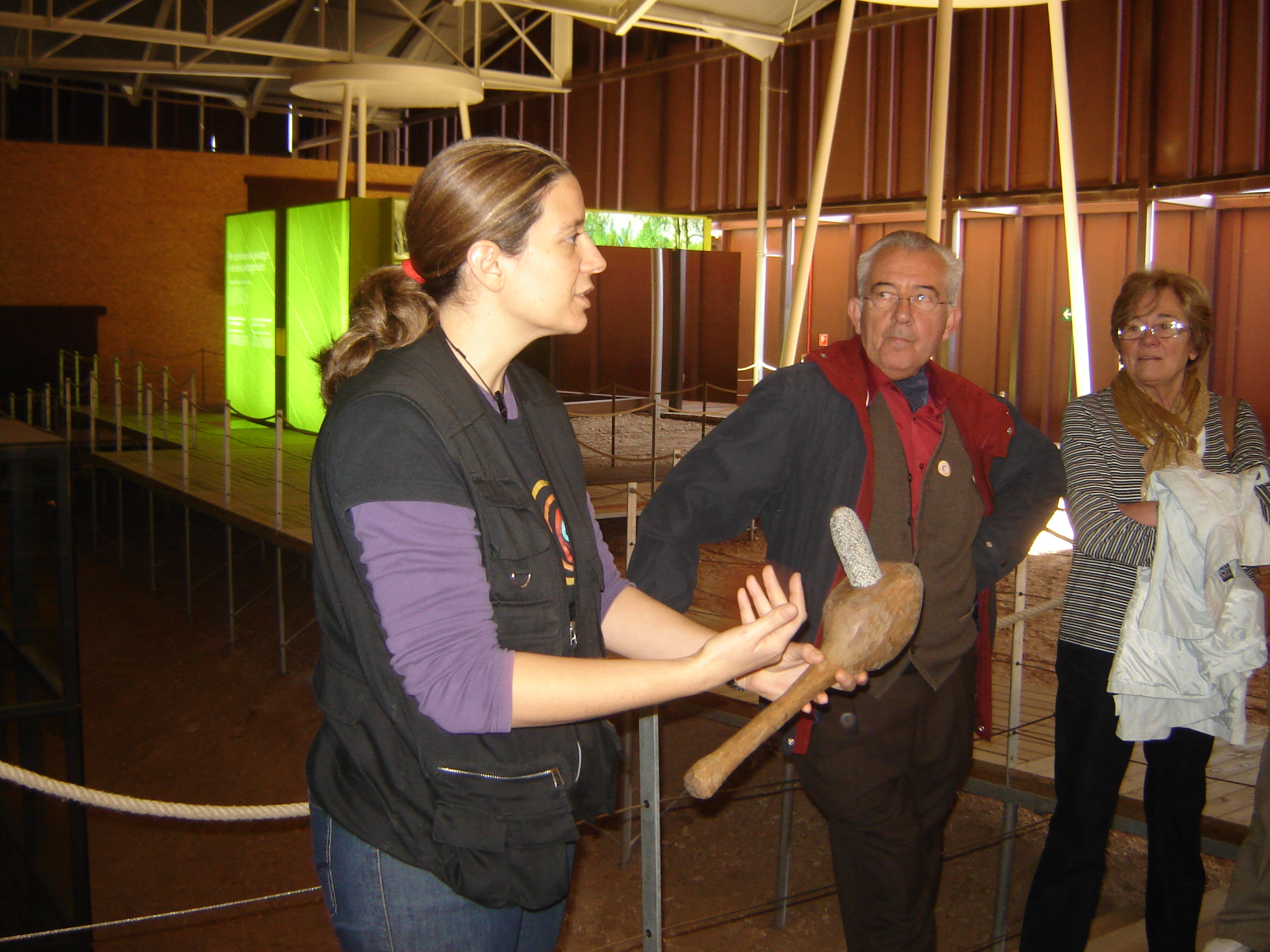 Arqueòloga ensenyant una eina neolítica tal com la feien els habitants de les mines de Gavà